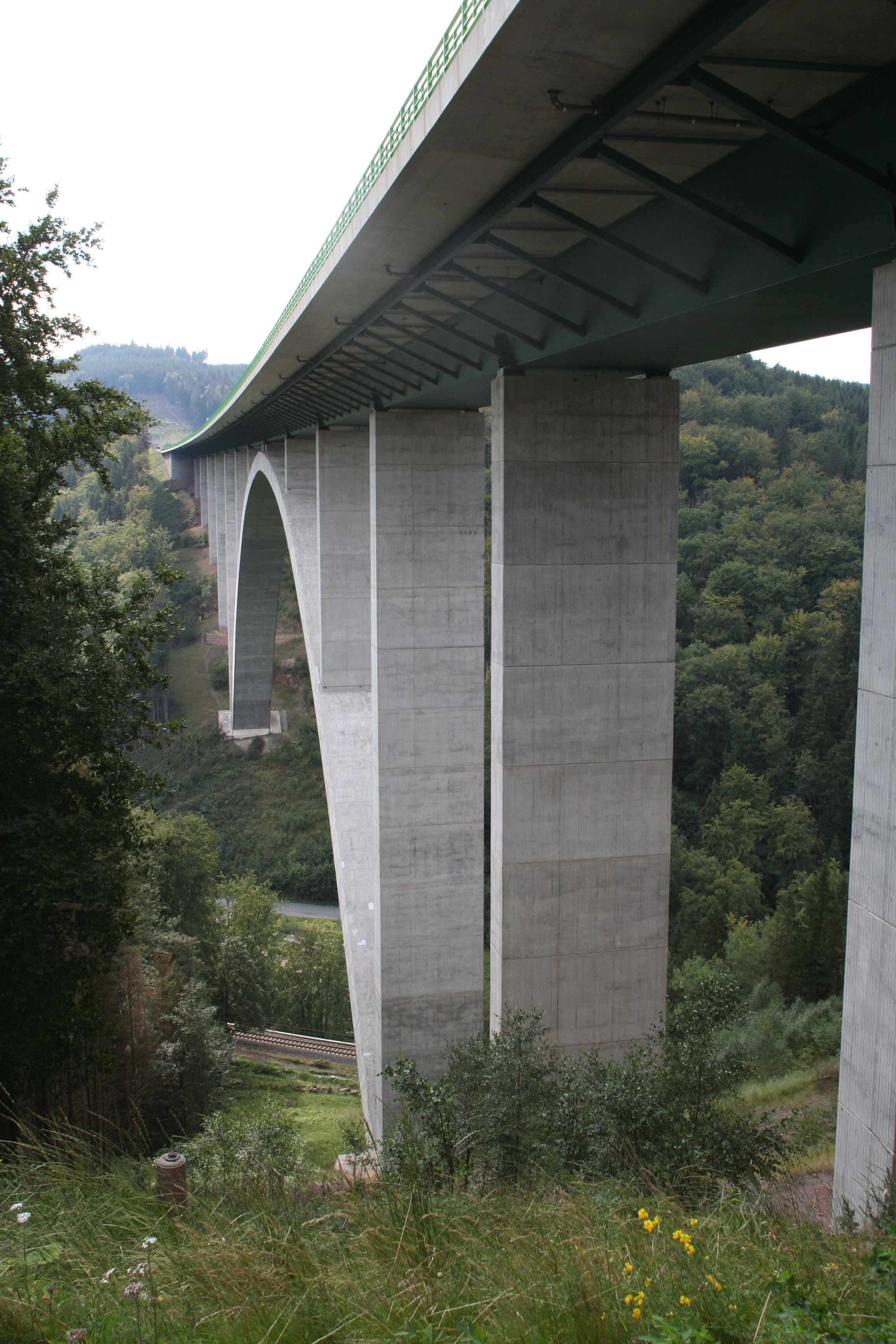 Talbrücke Wilde Gera, Bundesautobahn 71 bei Gräfenroda in Thüringen